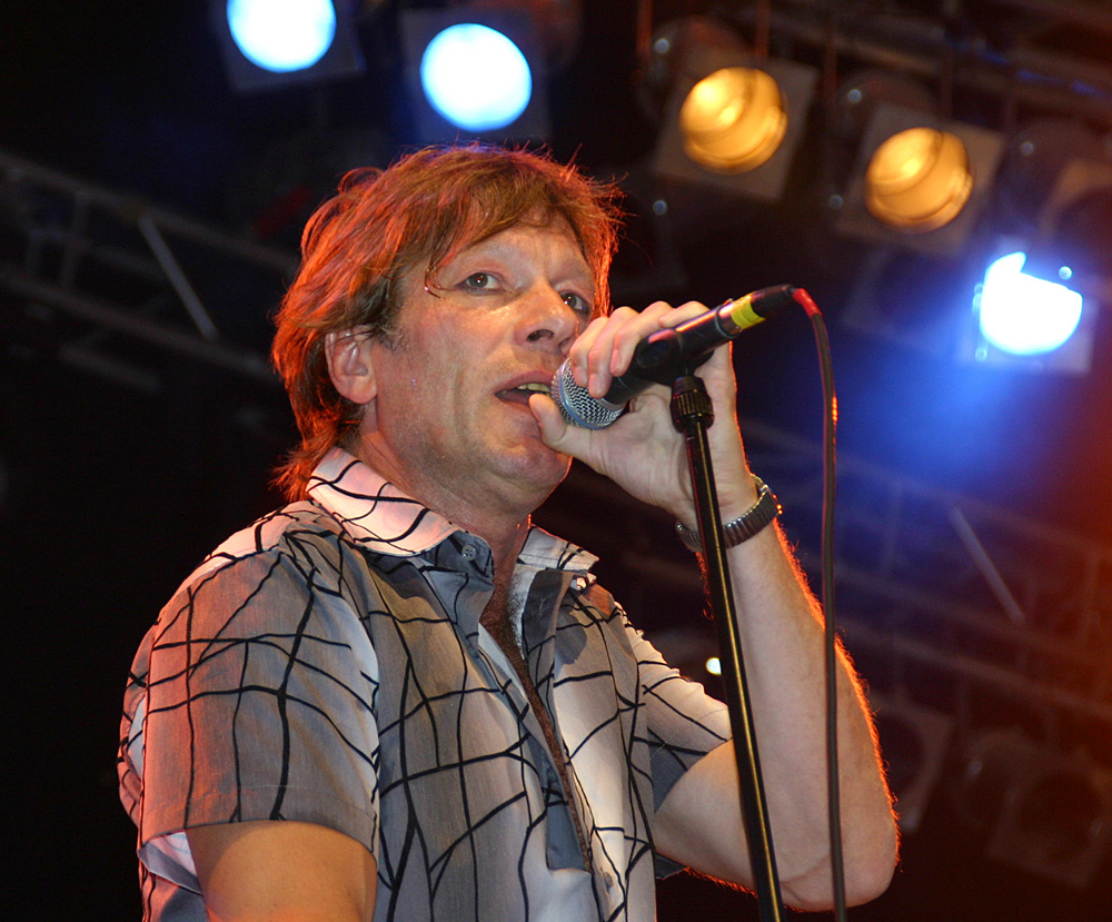 Gerd Köster, German singer-songwriter of Cologne Medienfest Bonn, 2005-09-01 author: Elke Wetzig (elya)